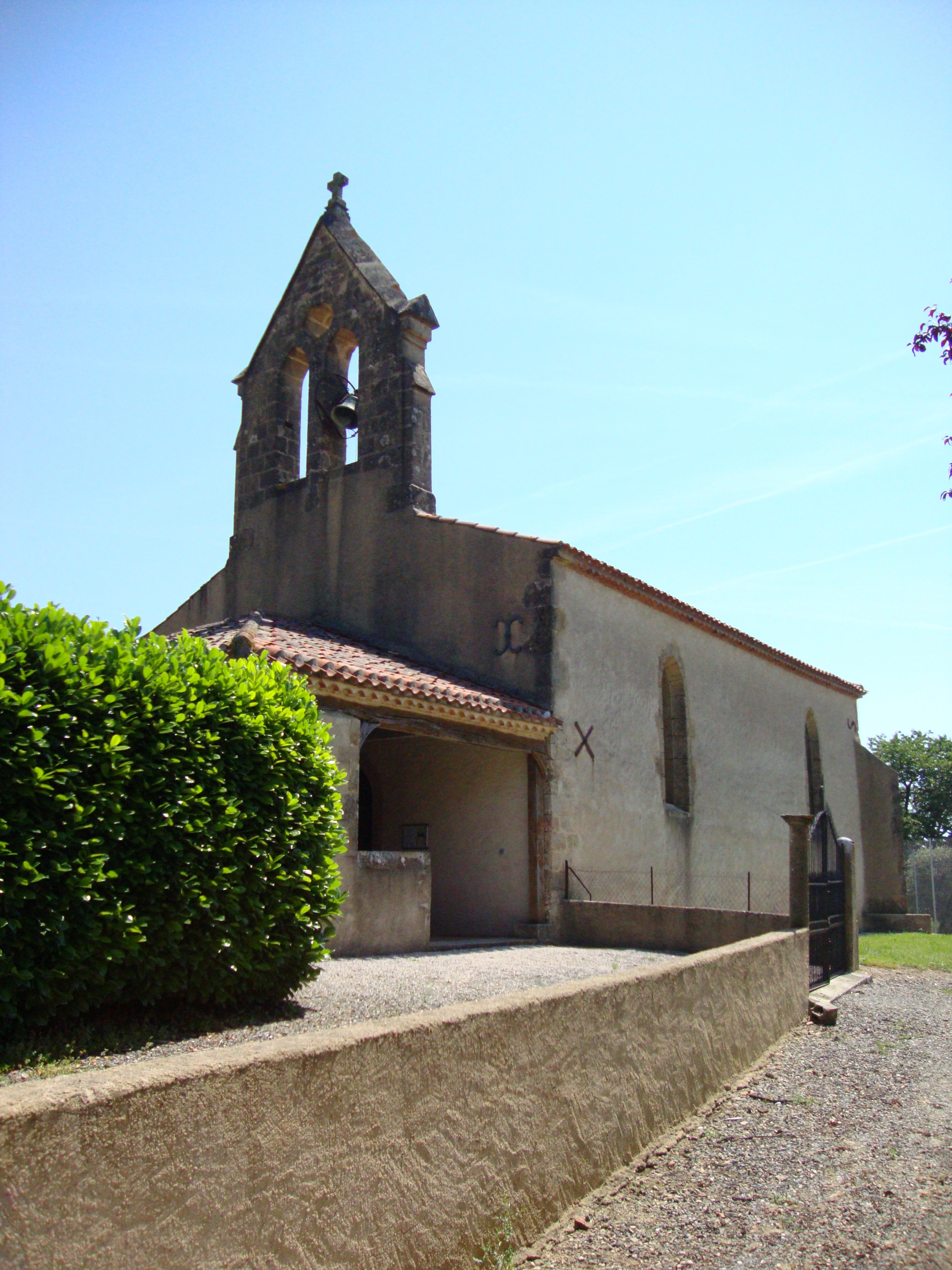 Mascaras (Gers, Fr) église